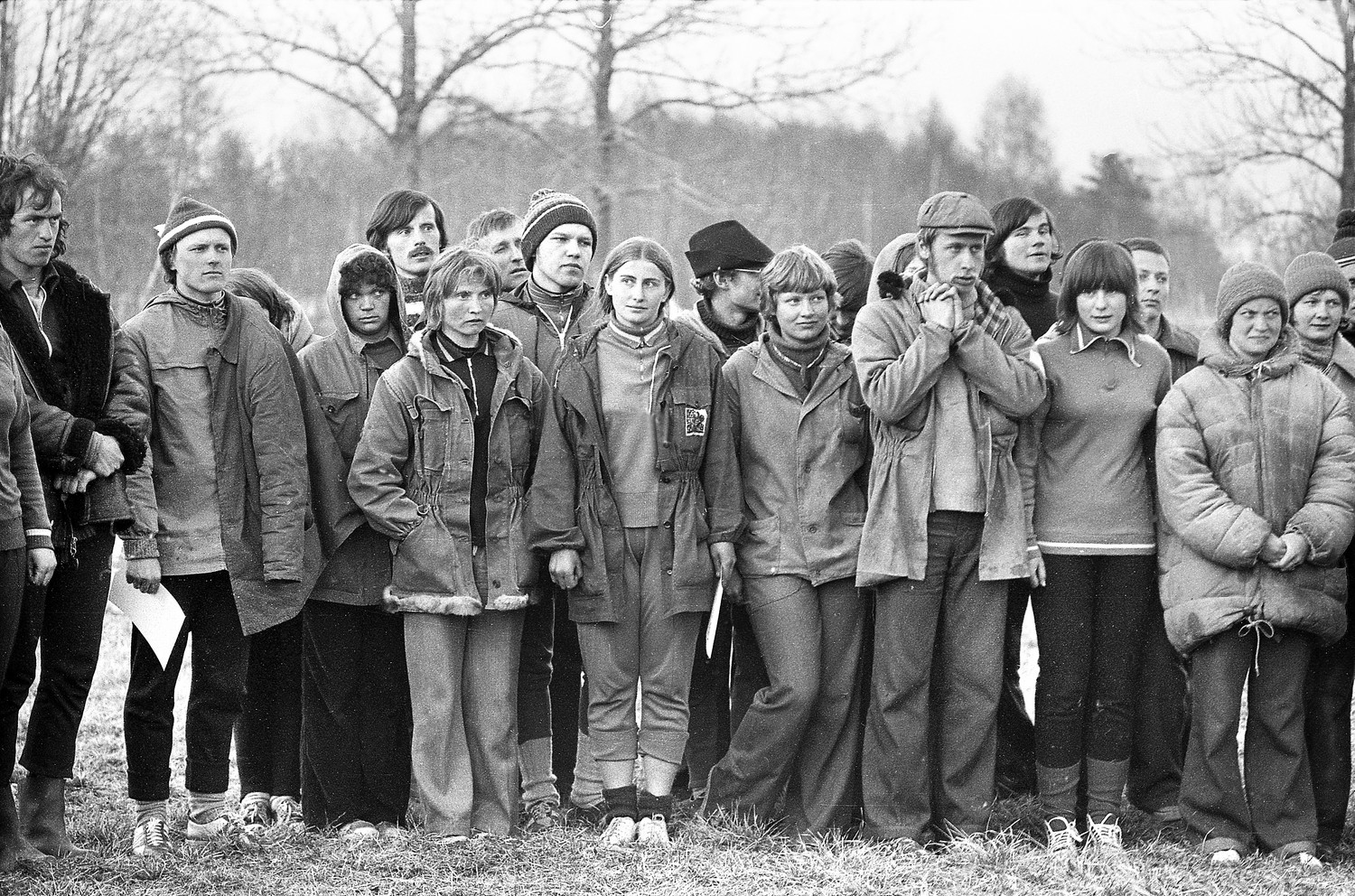 Ontika pank. Balticumi võistlused ronimises, Eesti võistkond 78-79